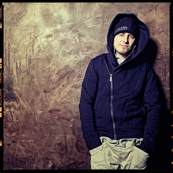 Marcin „AbradAb” Marten – polski raper, członek katowickiej grupy Kaliber 44